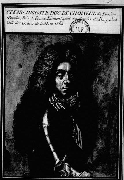 portrait du 3ème duc de Choiseul